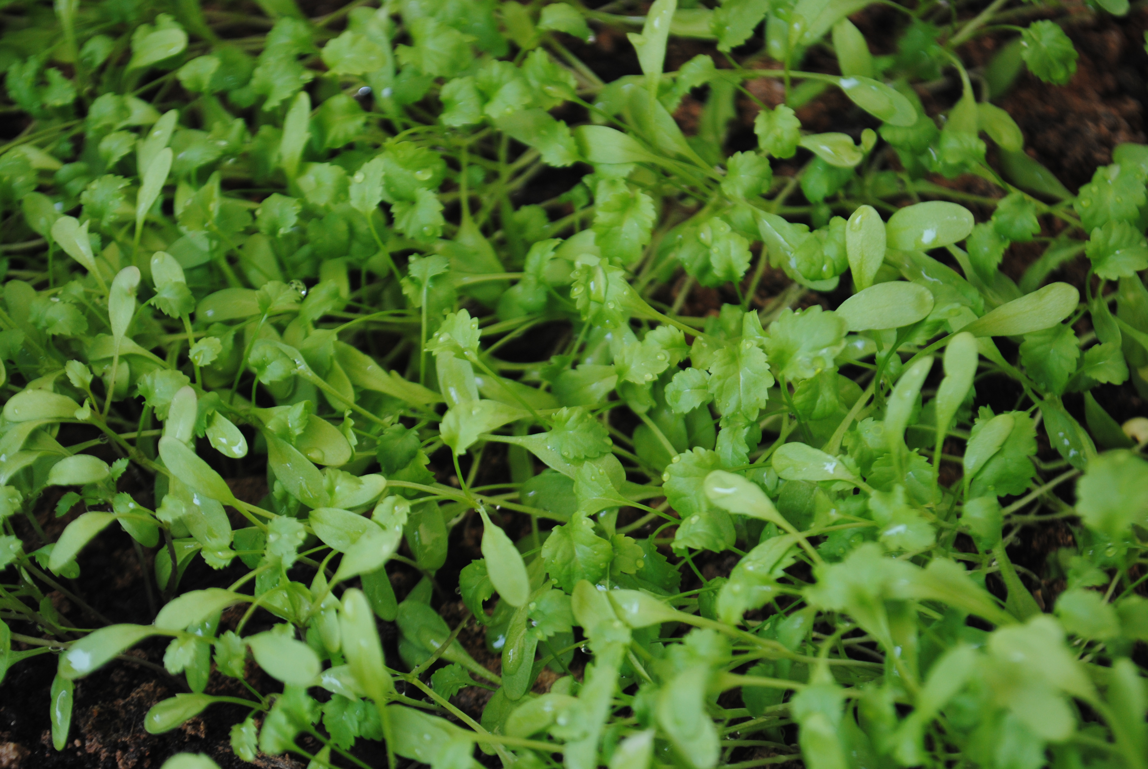 tere görüntüleri